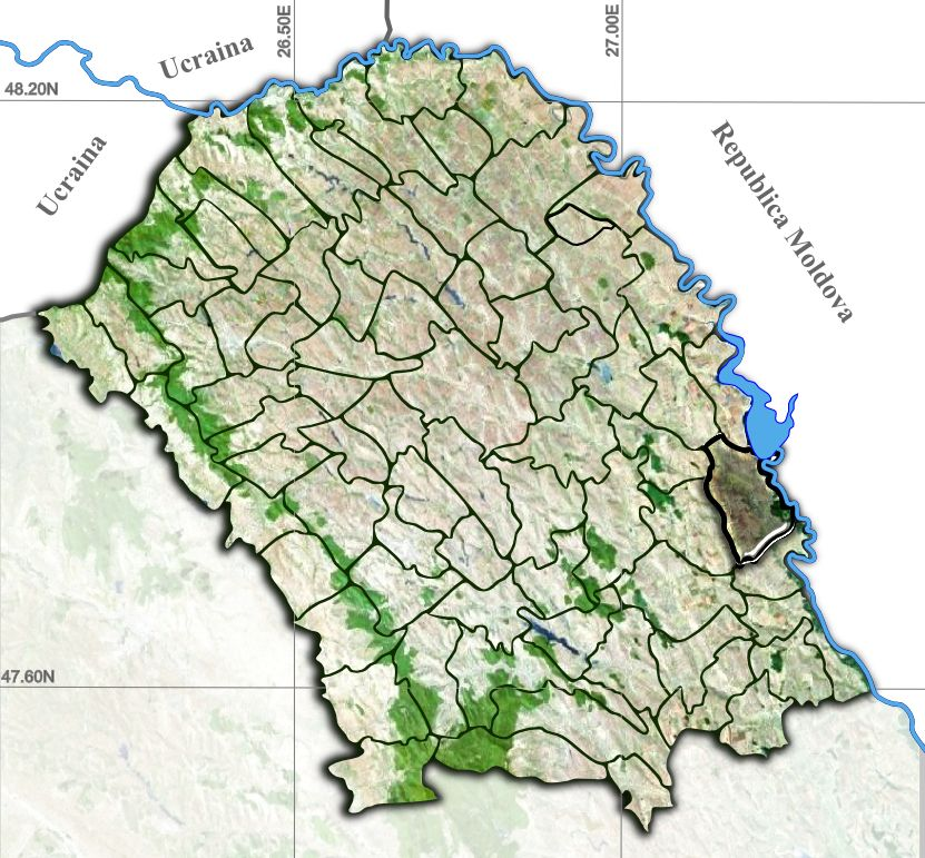 Stefanesti jud Botosani.